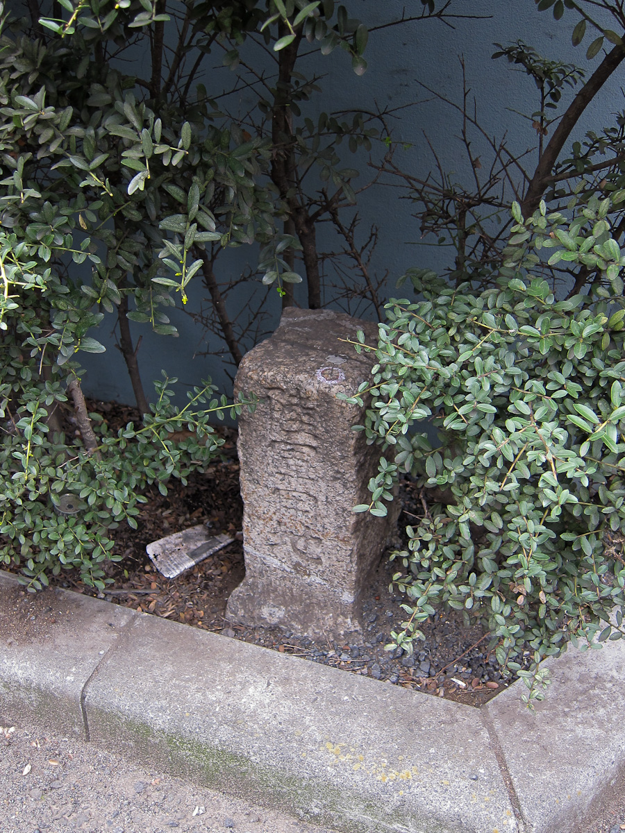 渋谷東急ハンズ前渋谷区清掃事務所宇田川分室に残る「陸軍用地」の境界標。東京都渋谷区宇田川町。